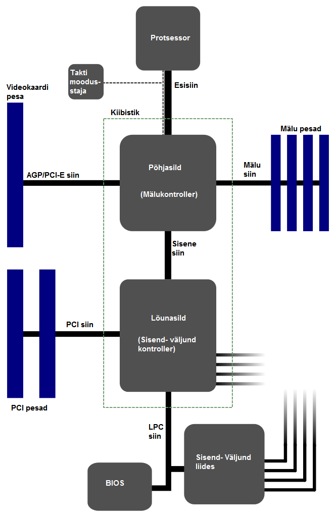 Emaplaadi diagramm